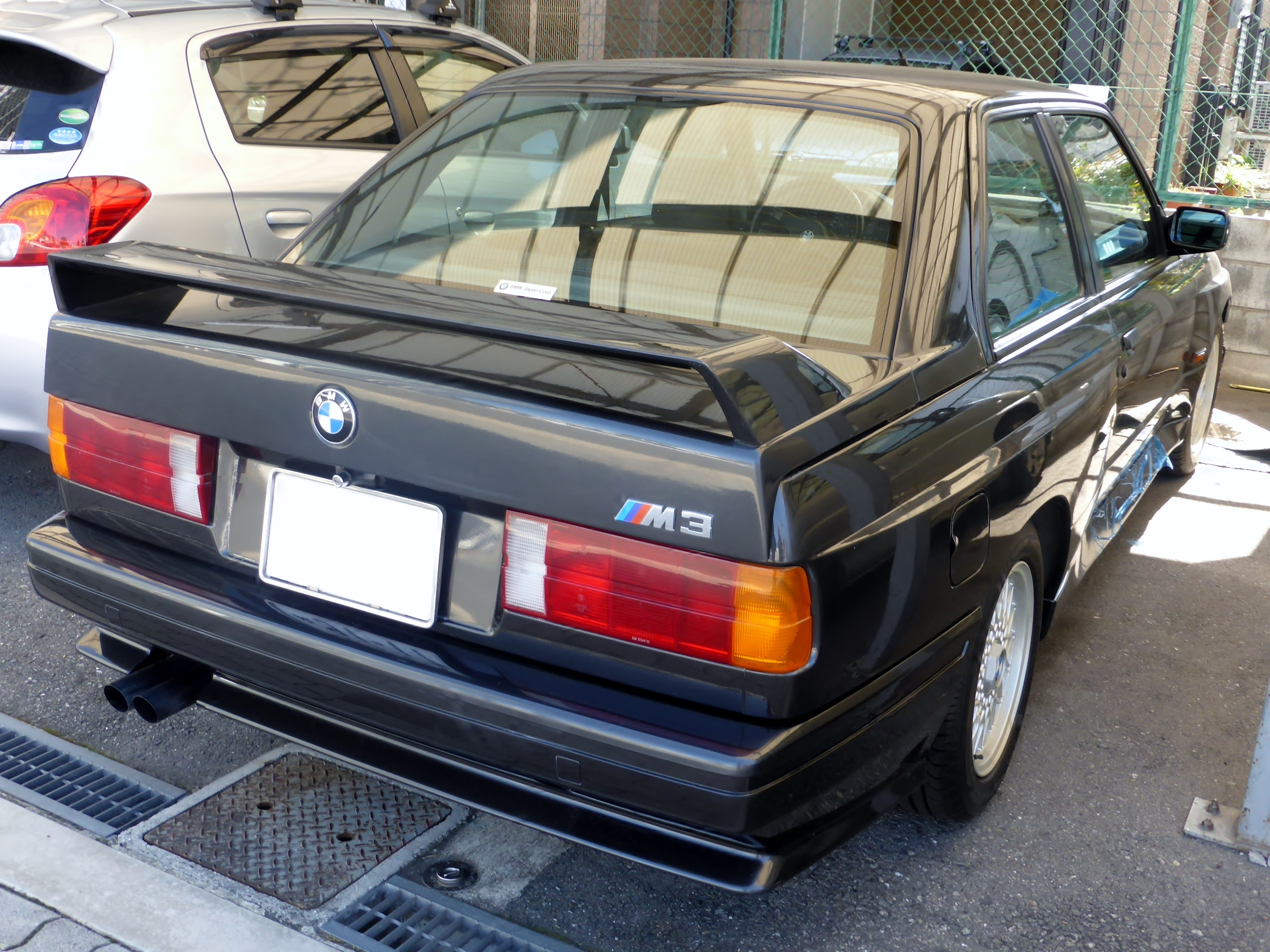 E30型BMW・M3をリアから撮影。